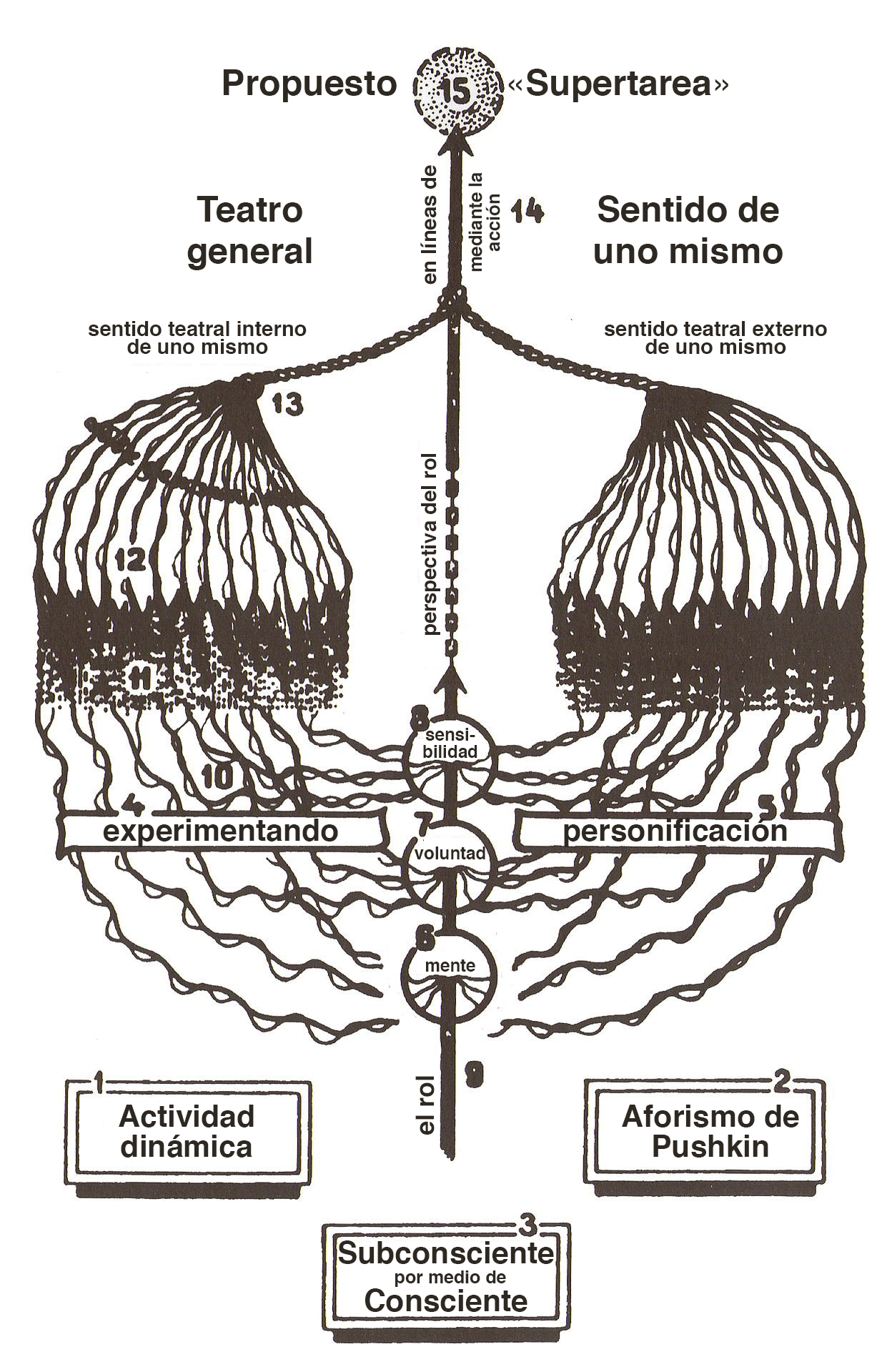 Diagrama del sistema teatral propuesto por Konstantín Stanislavski («el método»)